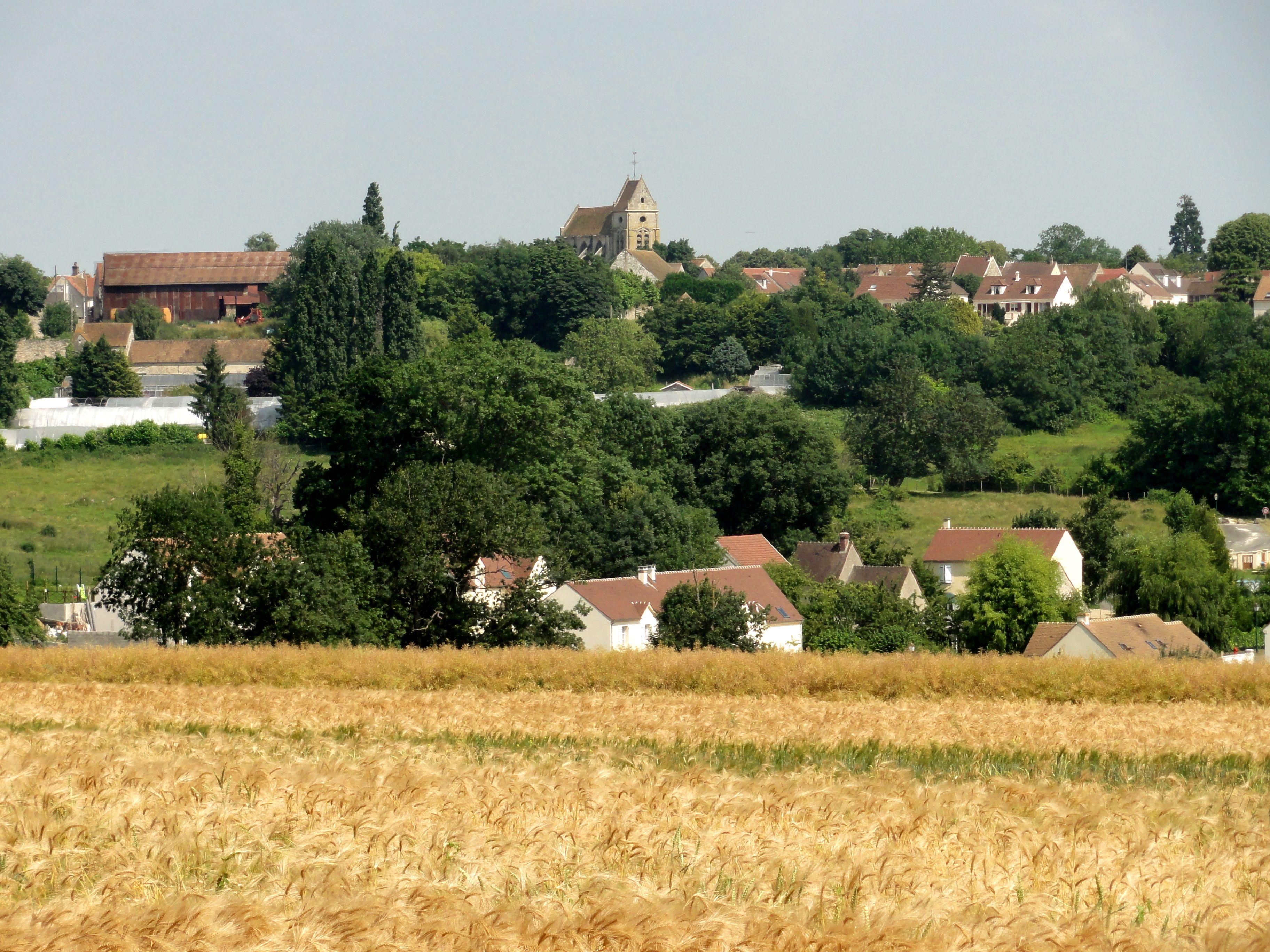 Vue sur le village depuis l'ouest.